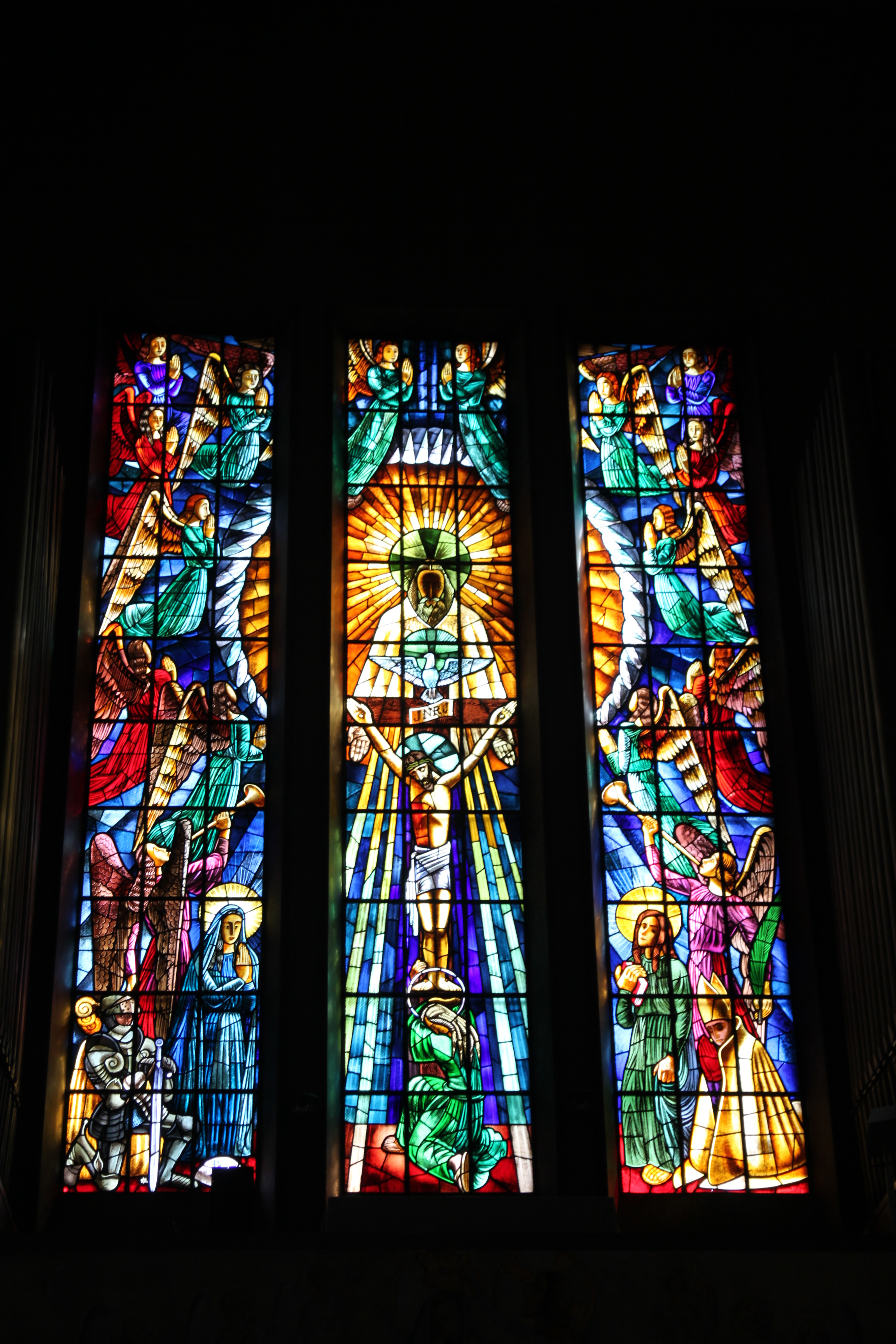 Igreja de Nossa Senhora de Fátima; vitral de Almada Negreiros This file was uploaded for Wiki Loves Monuments in Portugal with the unique identifier 74184.